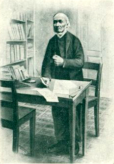 H. Uthusliens tegning av Ivar Aasen fra 1891